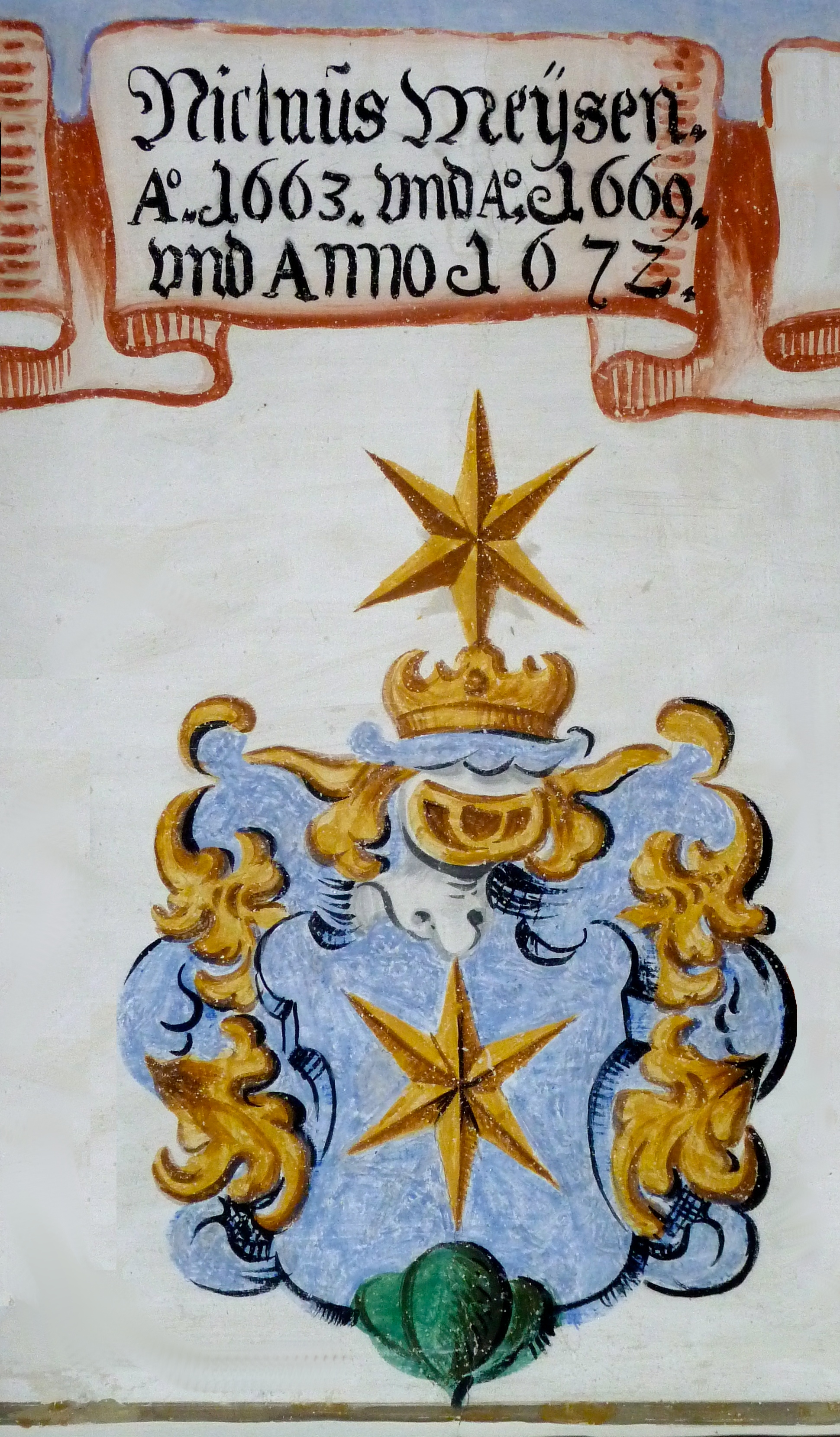 Wappen von Clau Maissen im Cuort Ligia Grischa